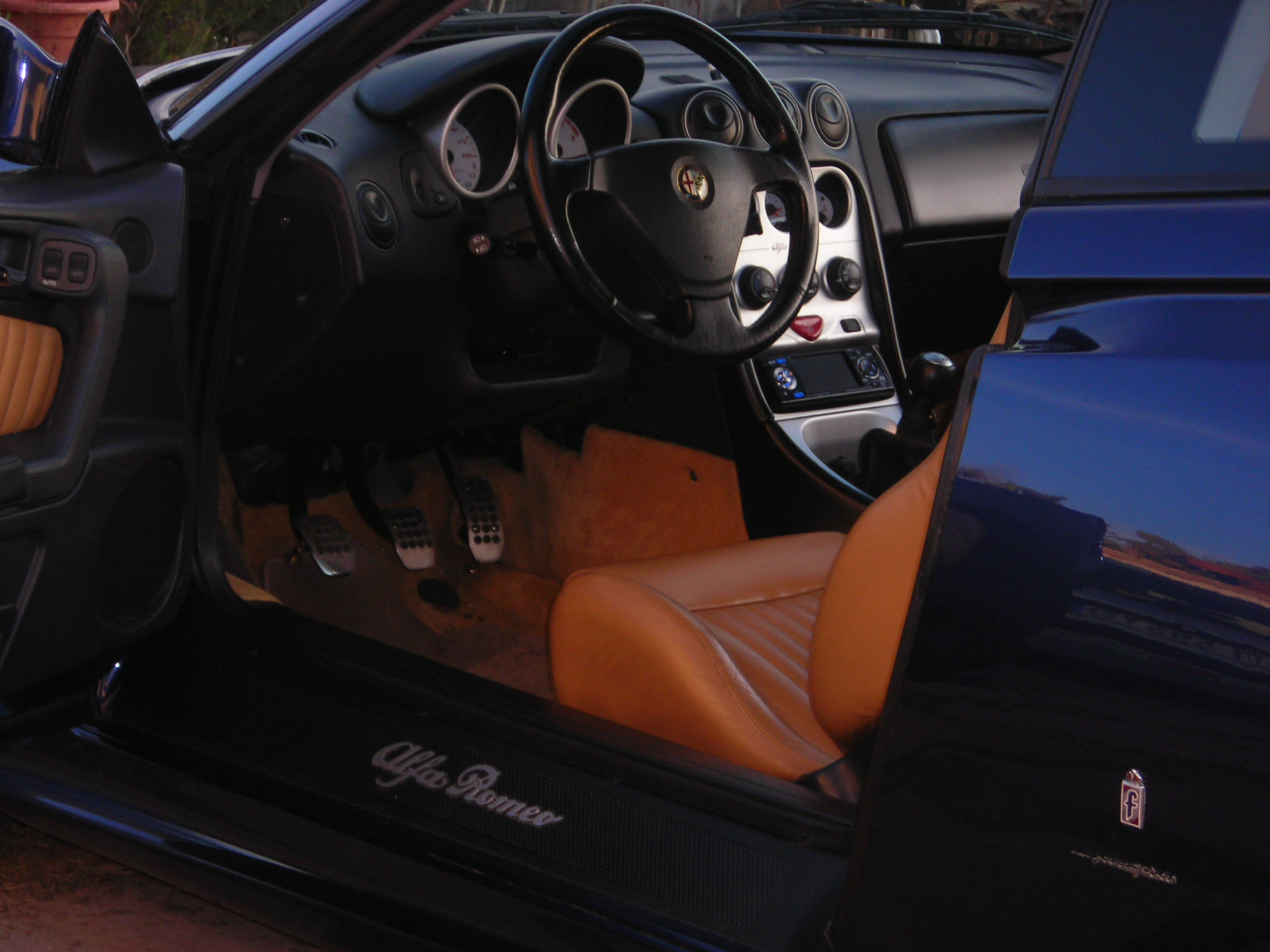 Scorcio d'interno di Alfa Romeo GTV TB V6 Lusso Aerokit del 2001